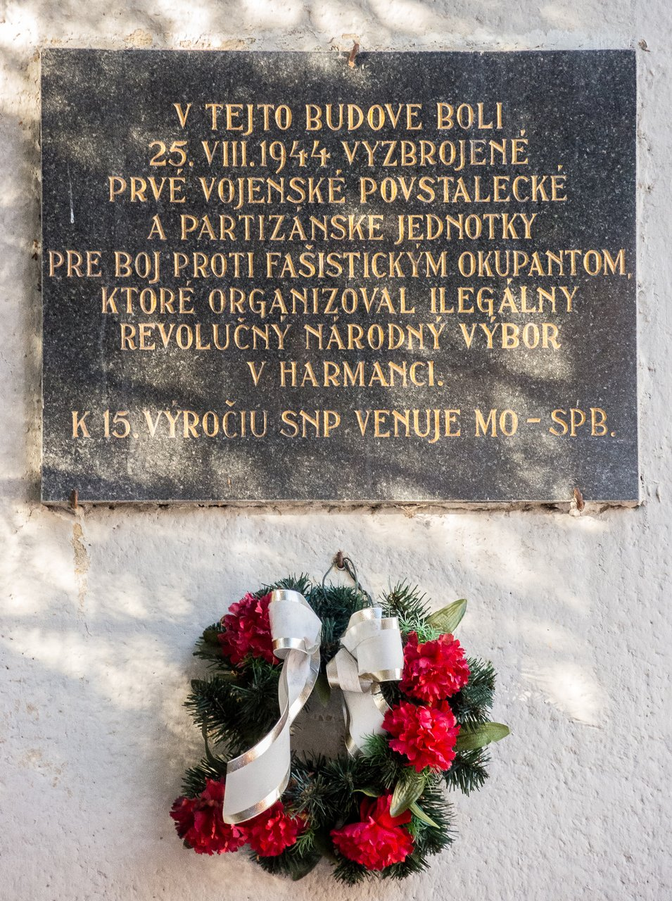 Pamätná tabuľa na bývalej administratívnej budove Vojenského kartografického ústavu Harmanec.